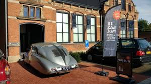 Бизариум музеј